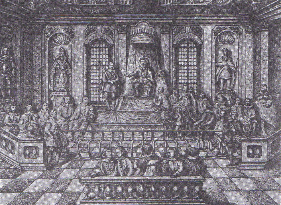 Zasedání moravského zemského sněmu v Zemském domě 17. století